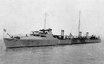 Truxtun class destroyer USS Whipple DD15